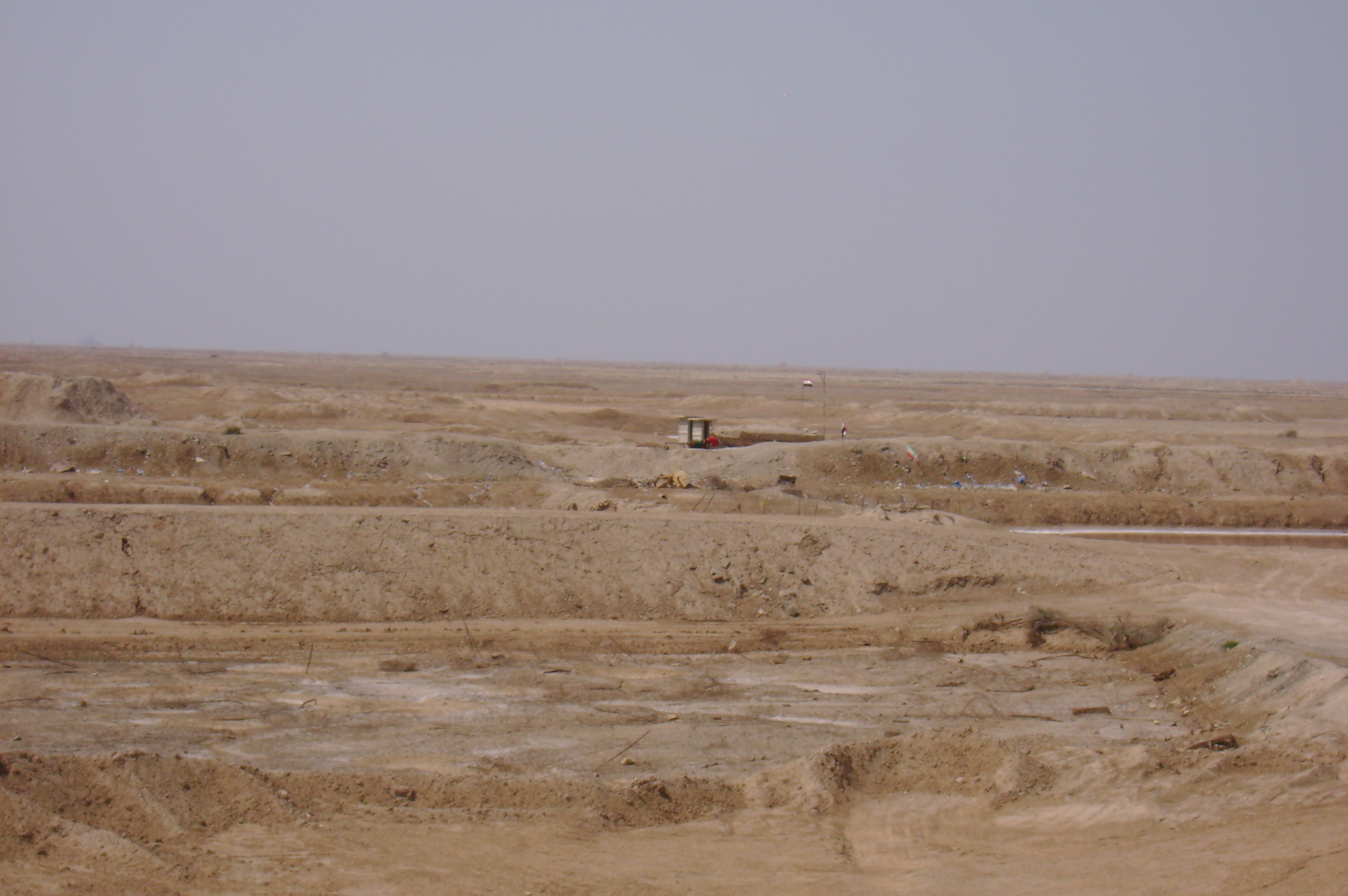 مرز شلمچه